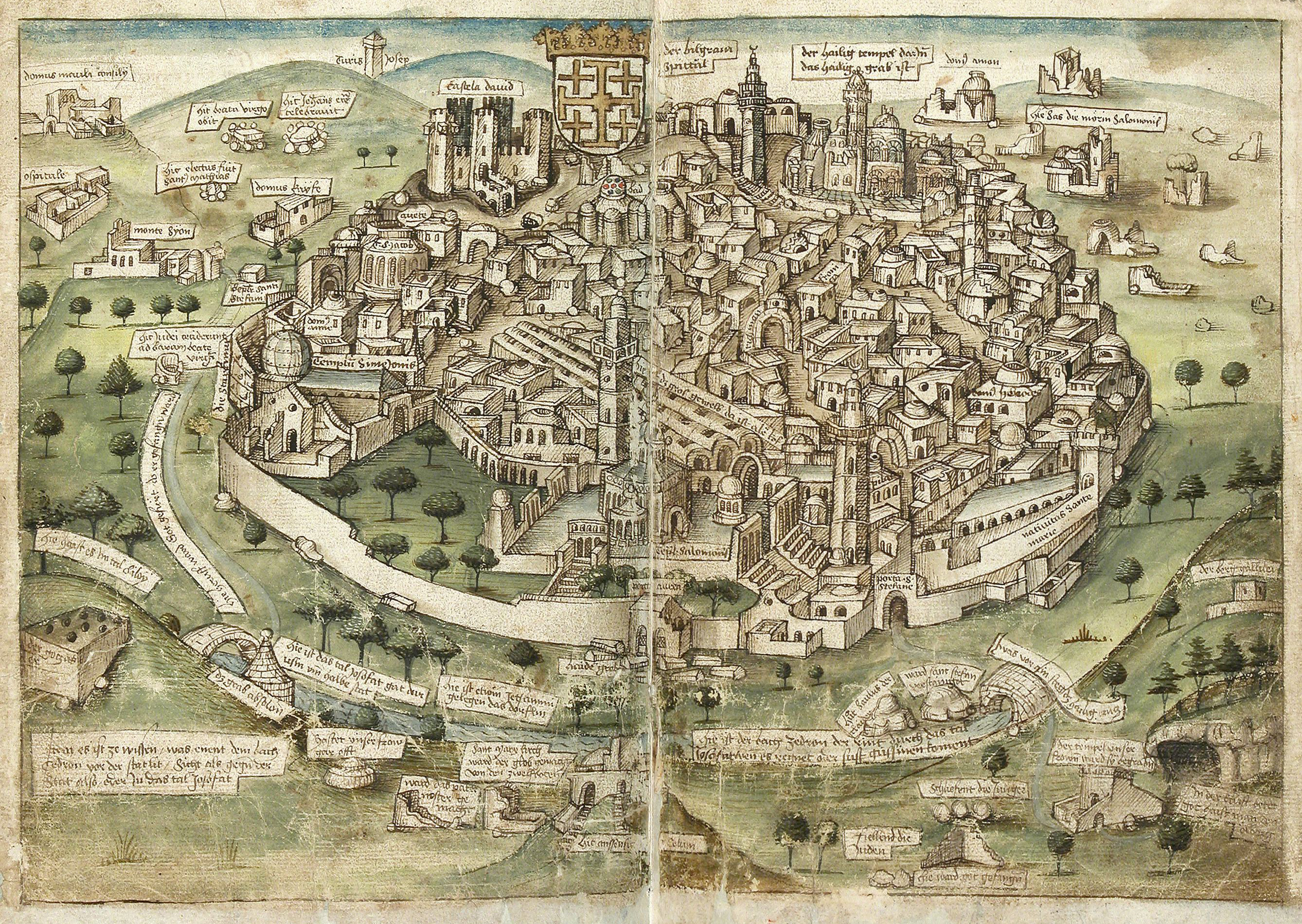 Doppelseite, aus Conrad Grünenberg: Beschreibung der Reise von Konstanz nach Jerusalem. Bodenseegebiet, um 1487. Badische Landesbibliothek Karlsruhe, Cod. St. Peter, pap. 32. Literatur: Andrea Denke, Konrad Grünembergs Pilgerreise ins Heilige Land 1486. Untersuchung, Edition und Kommentar (2010), p. 497.